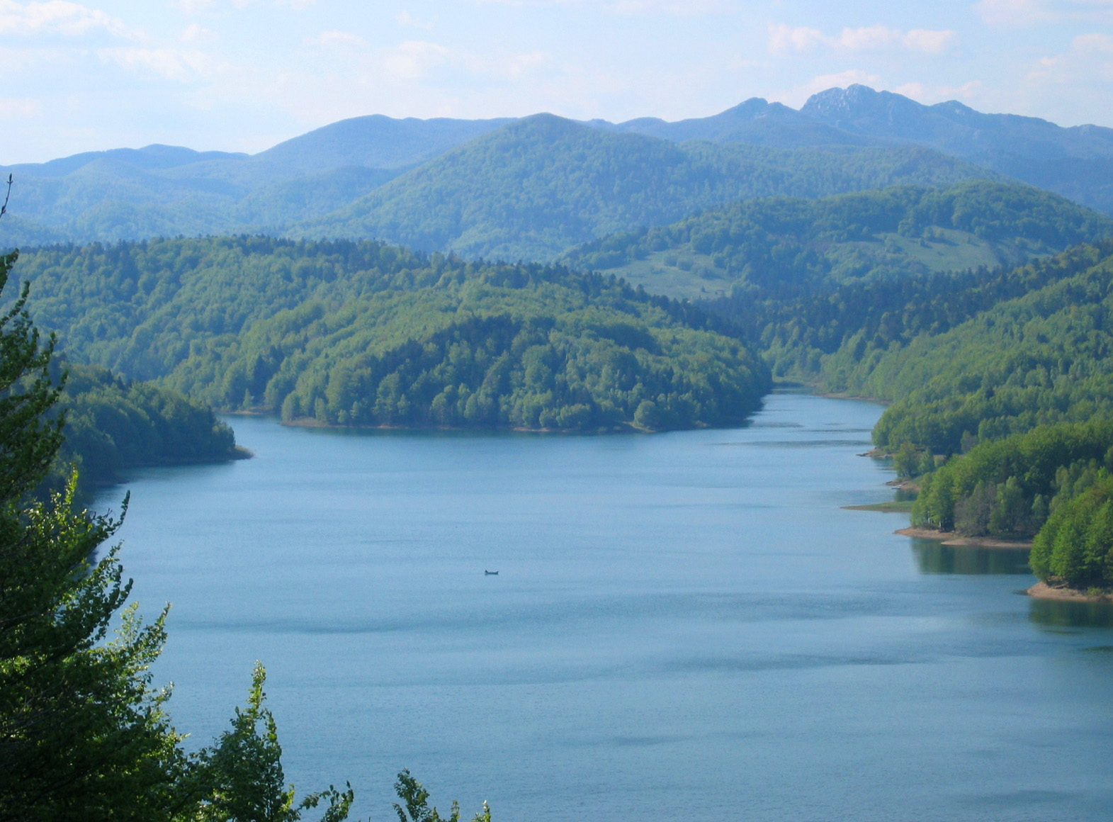 Lokvarsko jezero, lake in Gorski kotar, Croatia